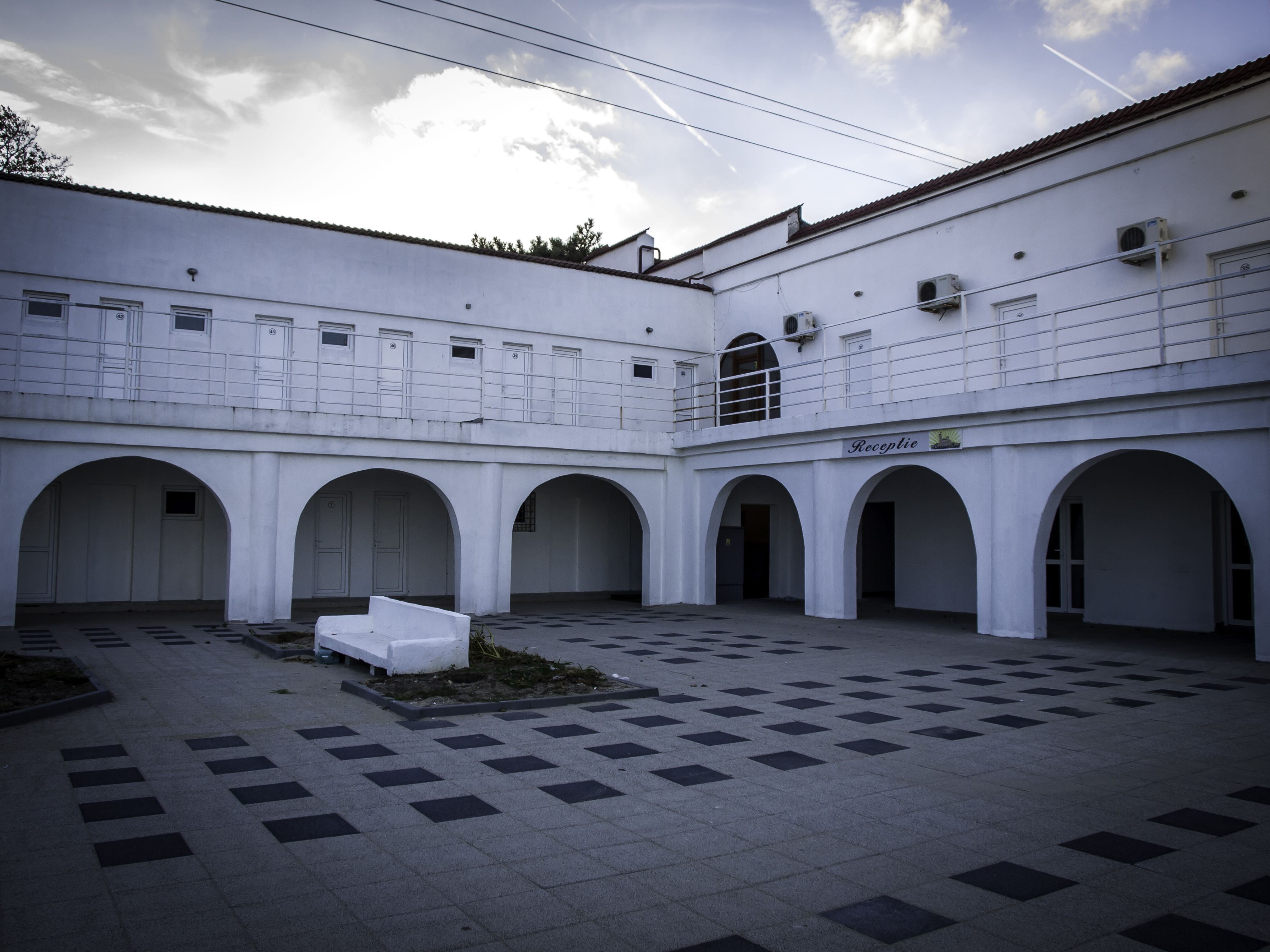 Corpuri laterale cu cabine - Receptie 02